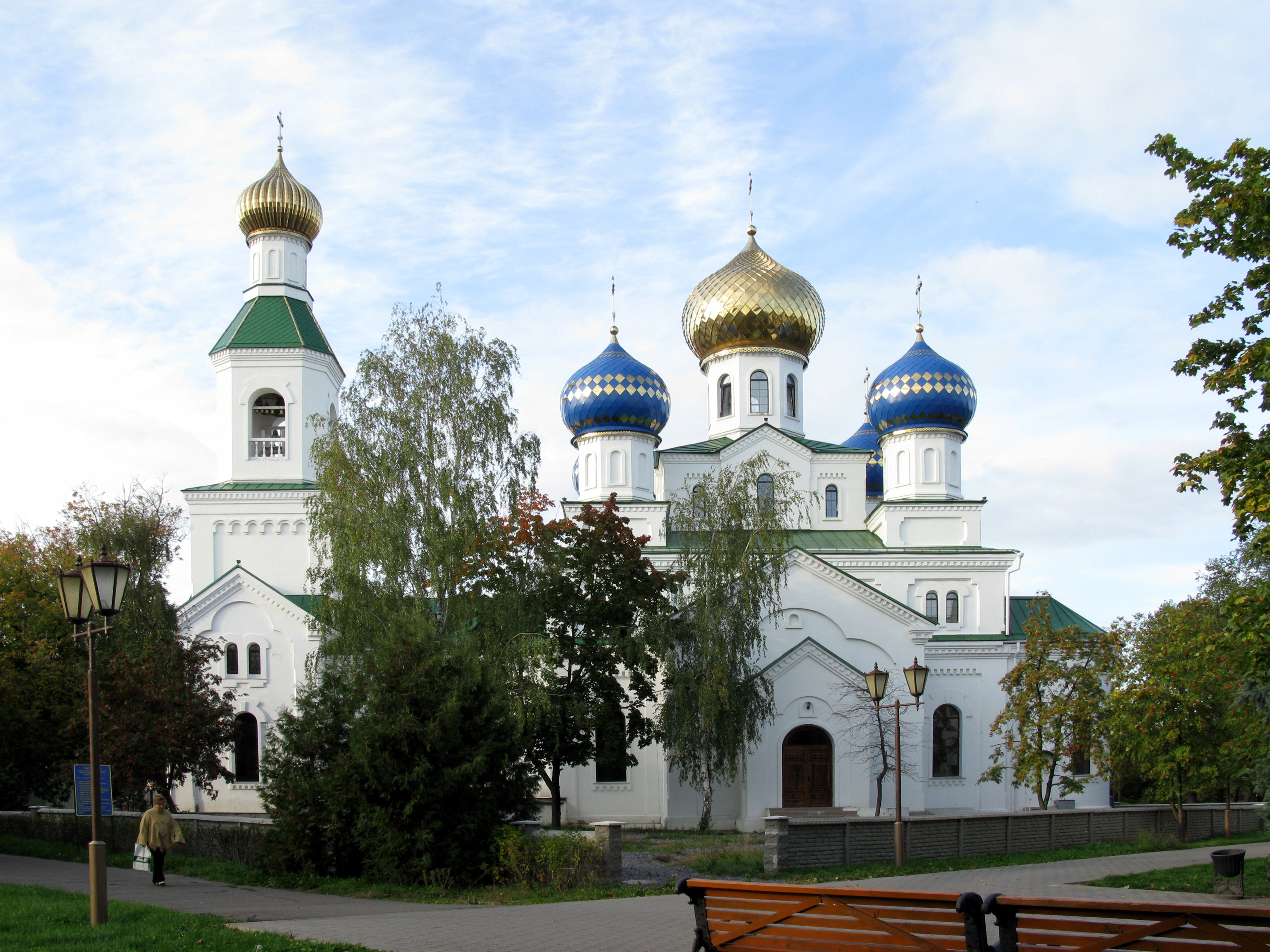 Никольский собор (Бобруйск, Могилёвская область, Белоруссия).